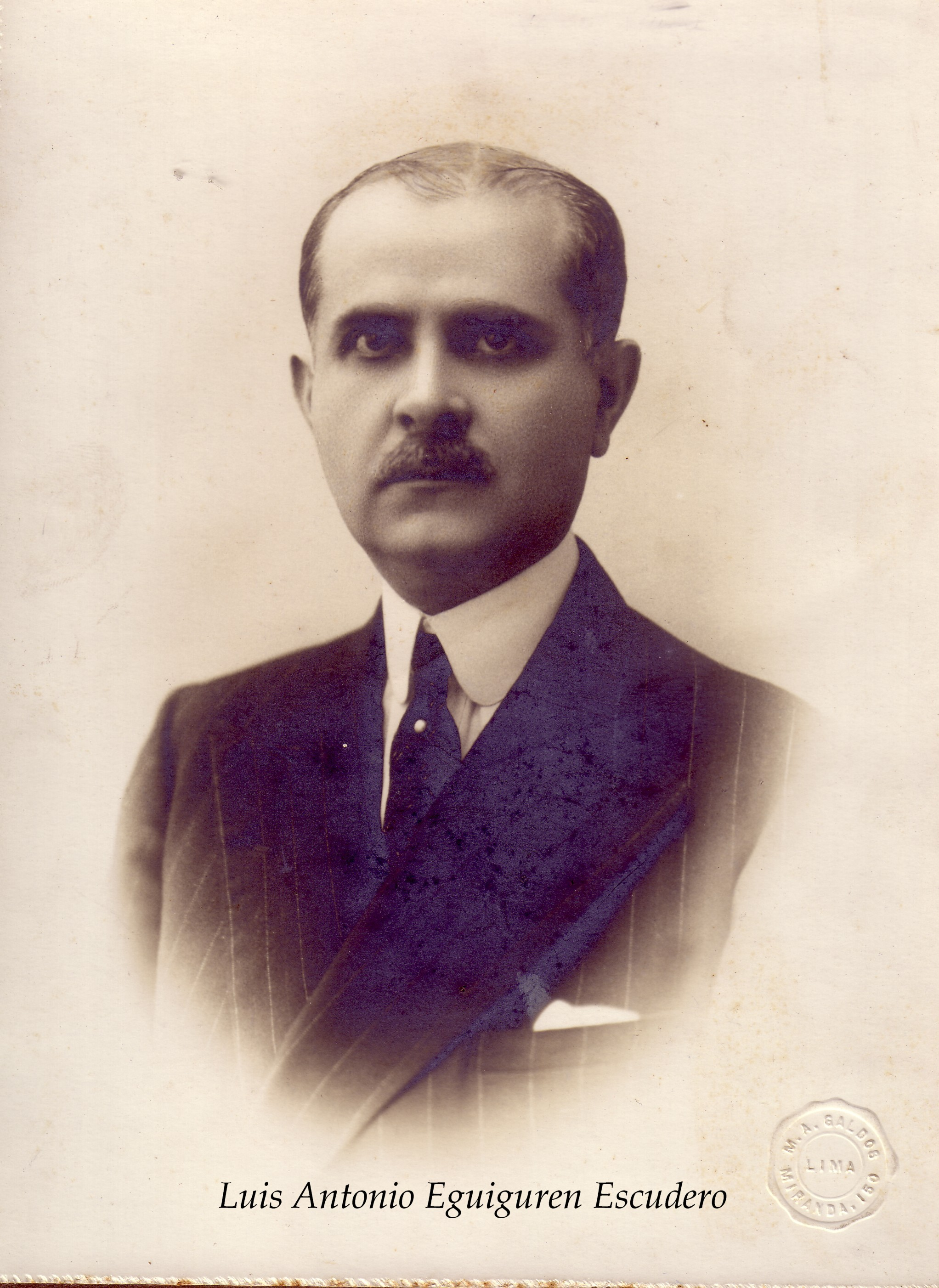 Se trata de una foto conservada por la familia. Yo soy nieto del personaje